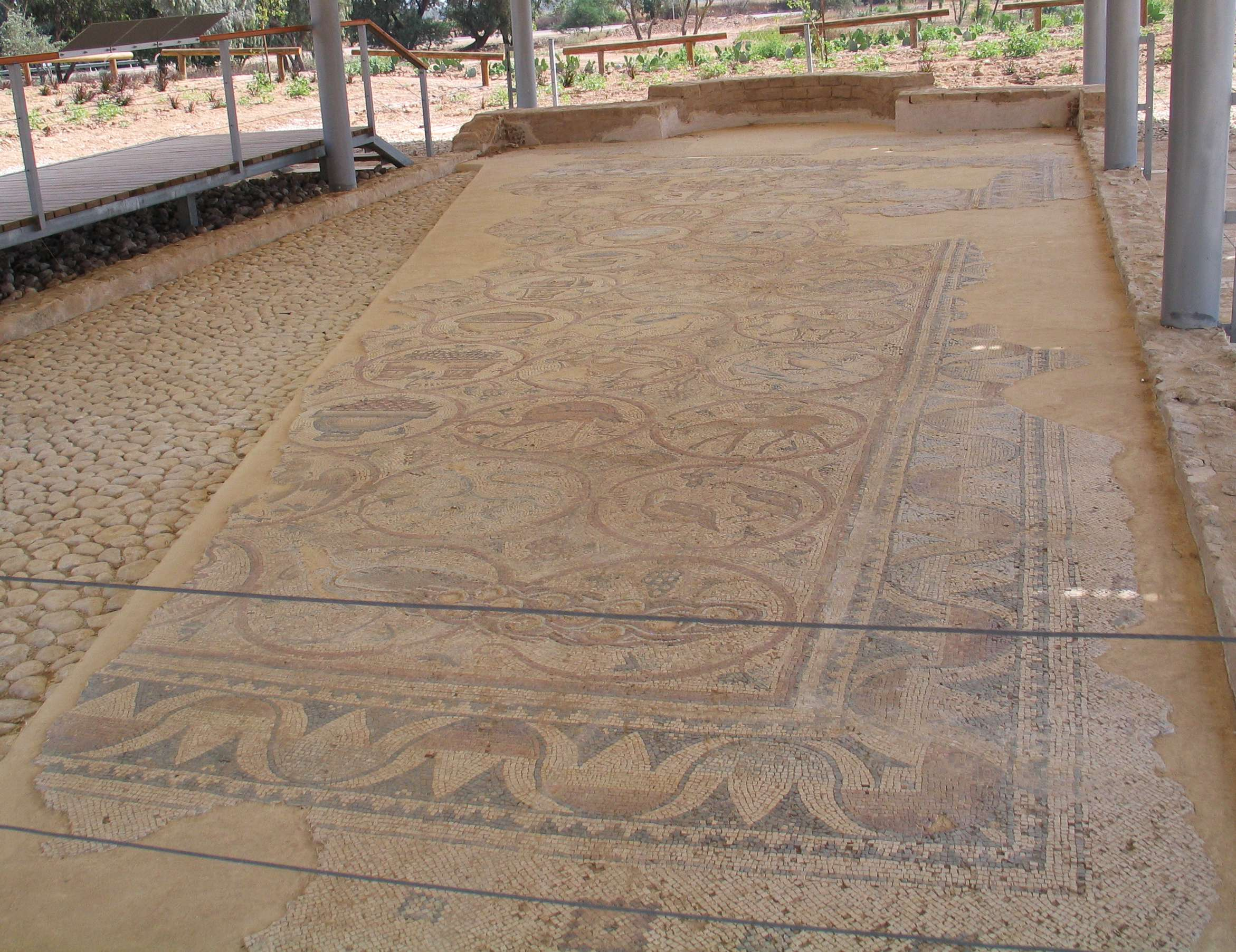 Maon synagogue, near kibutz Nirim, Israel.